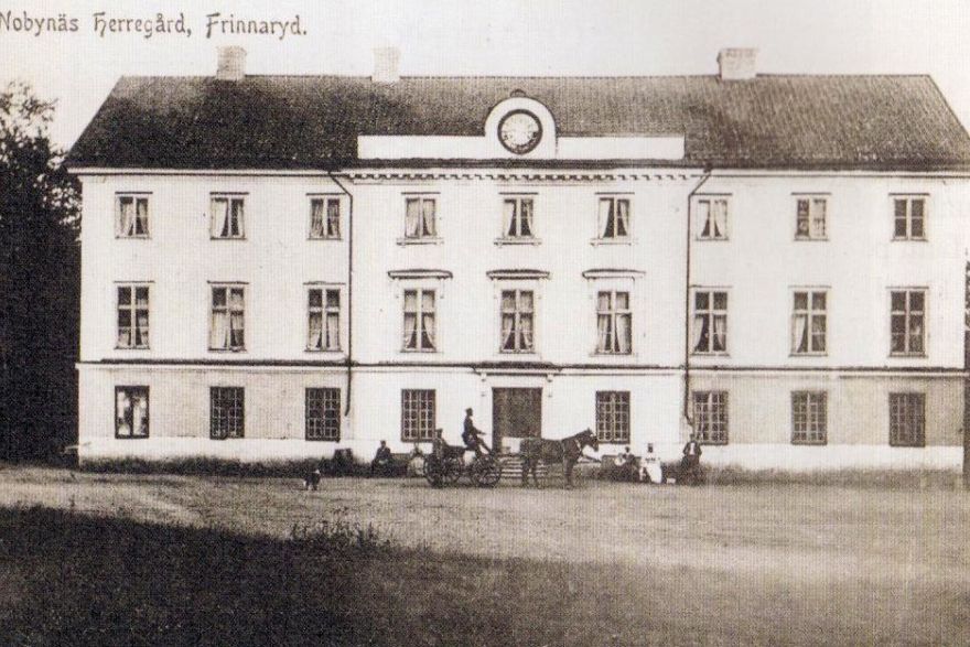 Nobynäs Manor, Frinnaryd, Jönköping county, Sweden